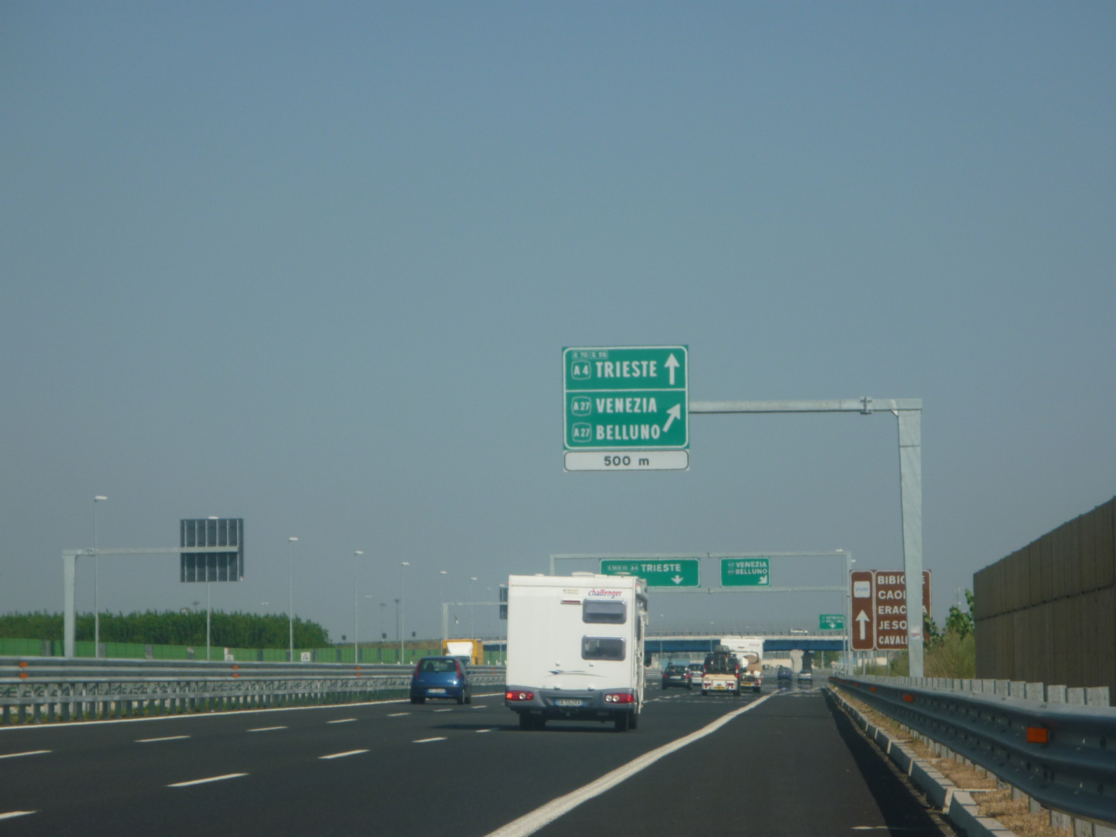 A4